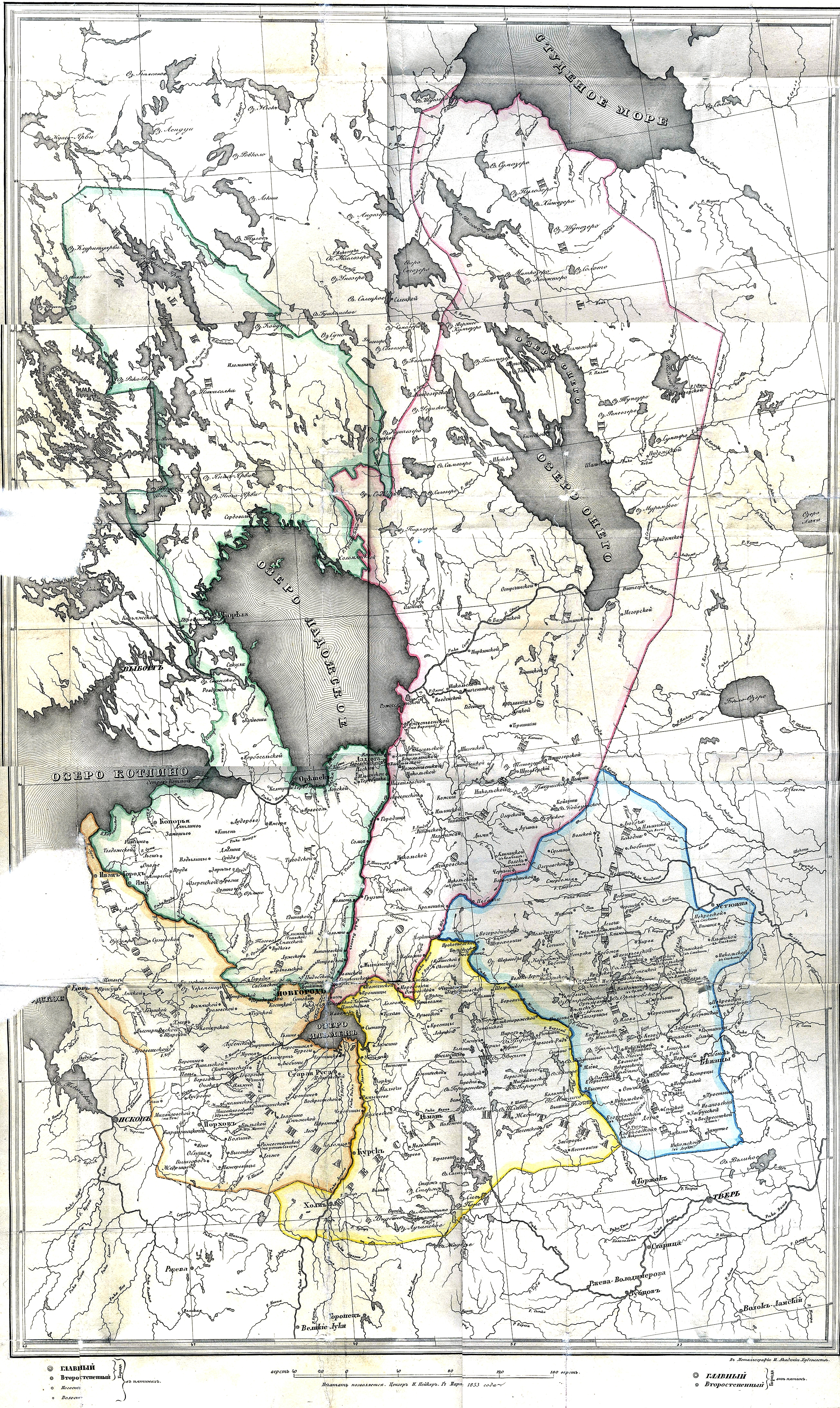 Карта из книги Неволина К.А. "О пятинах и погостах новгородских в XVI веке". Тип. императорской Академии Наук. Спб, 1853 год.